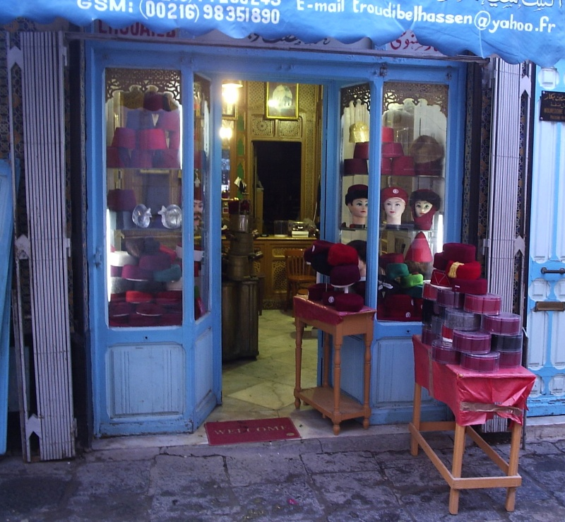 Atelier d'Artisant du chechia Tunisois